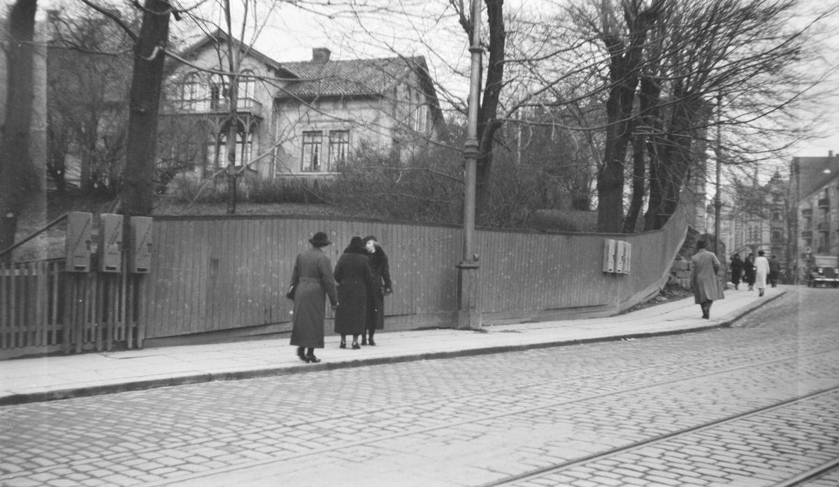 Smithebakken (Hegdehaugsveien mellom Josefines gate og Professor Dahls gate) fotografert av Fritz Holland den 18. april 1937. Fra Byhistorisk samling hos Oslo Museum.